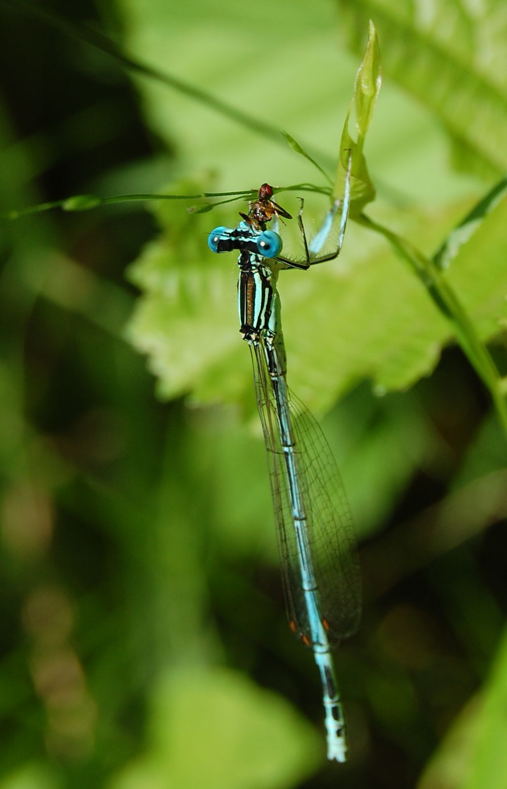 Platycnemis pennipes, ad. male